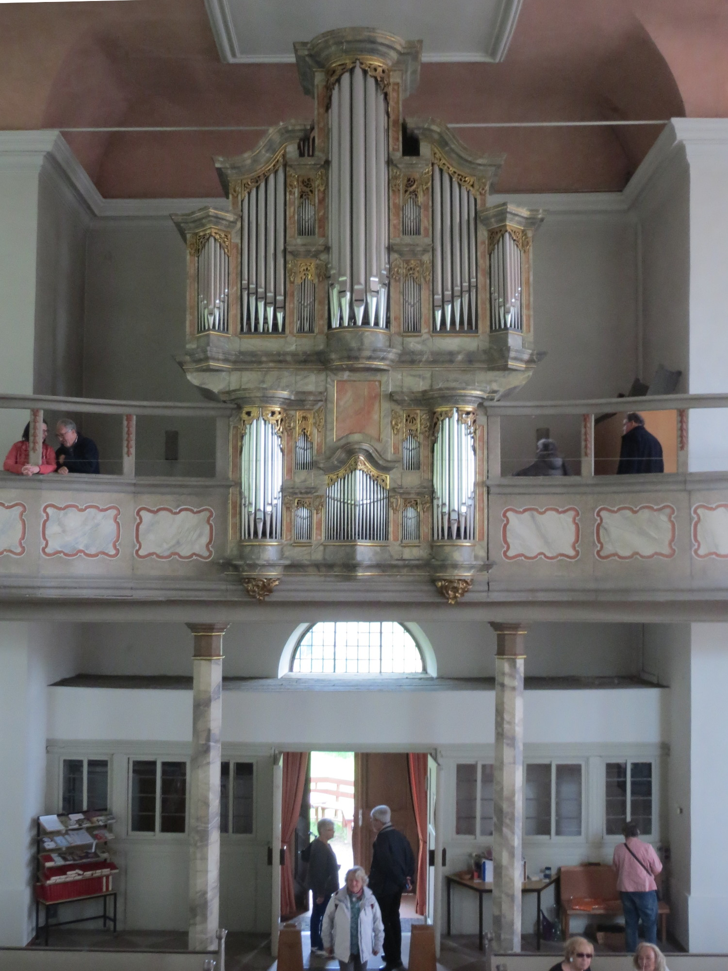 St. Martin (Jugenheim), erbaut 1769 bis 1775 nach Plänen von Friedrich Joachim Stengel